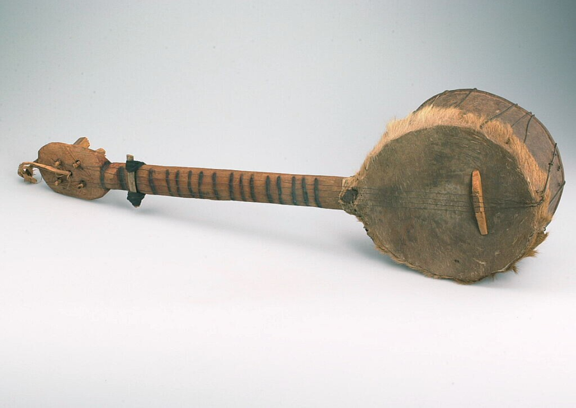 Deze 'Afrikaanse banjo' heeft 4 snaren, die over een kam naar het uiteinde van de klankkast lopen. Op de hals is een 'capo tasto' bevestigd: een apparaatje waarmee de vibreerlengte van de snaren veranderd kan worden. De klankkast is gemaakt van een gebruikt blik (een voorbeeld van zg. 'tweede gebruik') en met leer bedekt. In de hals zijn strepen ingebrand (frets) om aan te geven waar men de vingers moet neerzetten om een bepaalde toon te verkrijgen. Dit instrument wordt door kinderen gemaakt en bespeeld, en worden 'ramkies' genoemd. (Het instrument ziet er nieuw en ongebruikt uit; de kam en de stempennen zitten er nog op, wat bij oudere en gebruikte instrumenten meestal niet het geval is.)